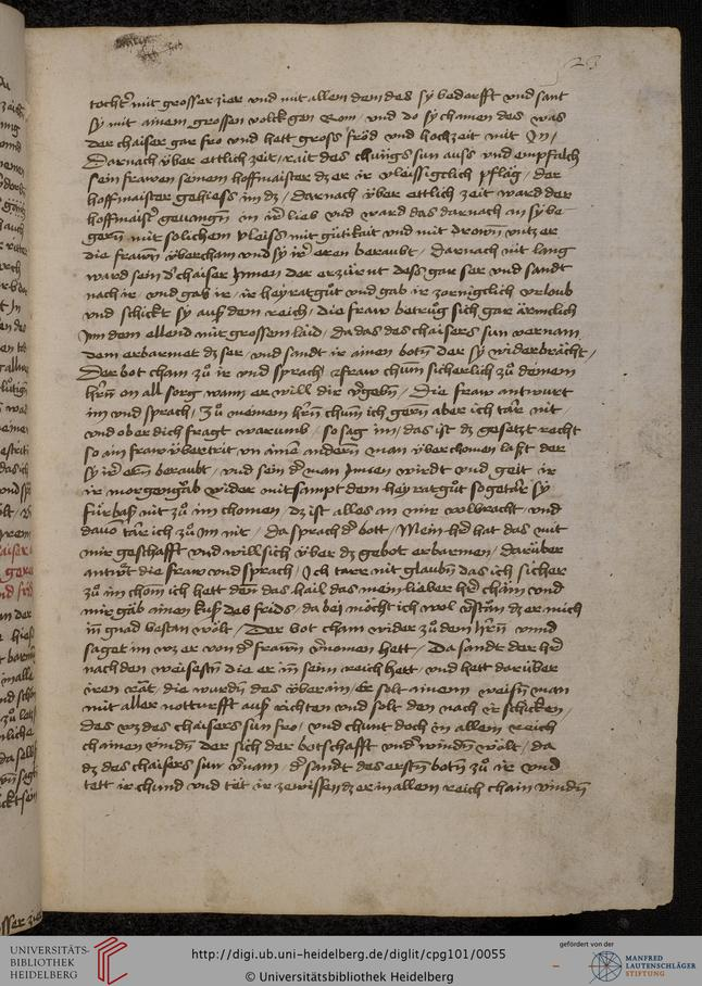 Pius ; Wyle, Niklas von [Übers.]. Cod. Pal. germ. 101: 'Gesta Romanorum', dt. ; Aeneas Silvius Piccolomini: De duobus amantibus Euryalo et Lucretia, in der Übersetzung des Niklas von Wyle (1. Translatze) ; Lucianus Samosatensis (Druck) ; Giovanni Boccaccio (Druck). Europeana. Retrieved on 2015-09-25.